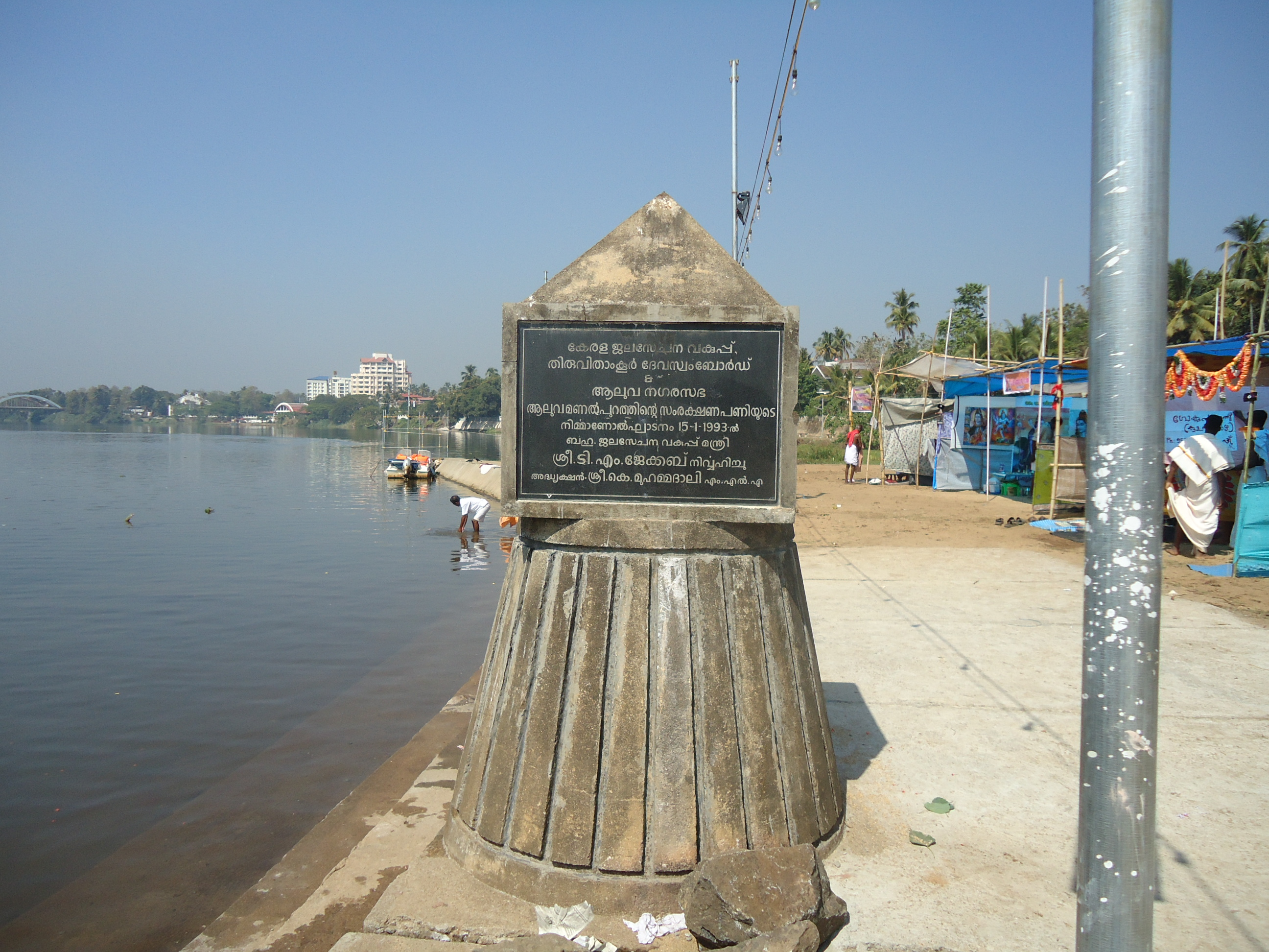 Aluva Manappuram Stone Board